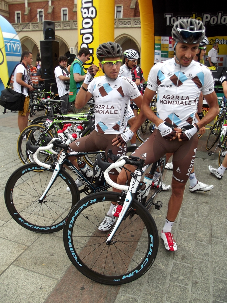 Zdjęcie zrobione podczas III etapu 70. jubileuszowego Tour de Pologne w Krakowie.